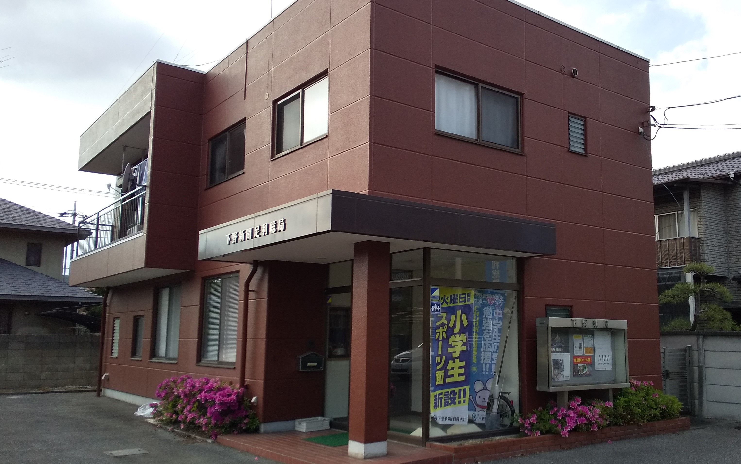 下野新聞社足利総局（栃木県足利市）